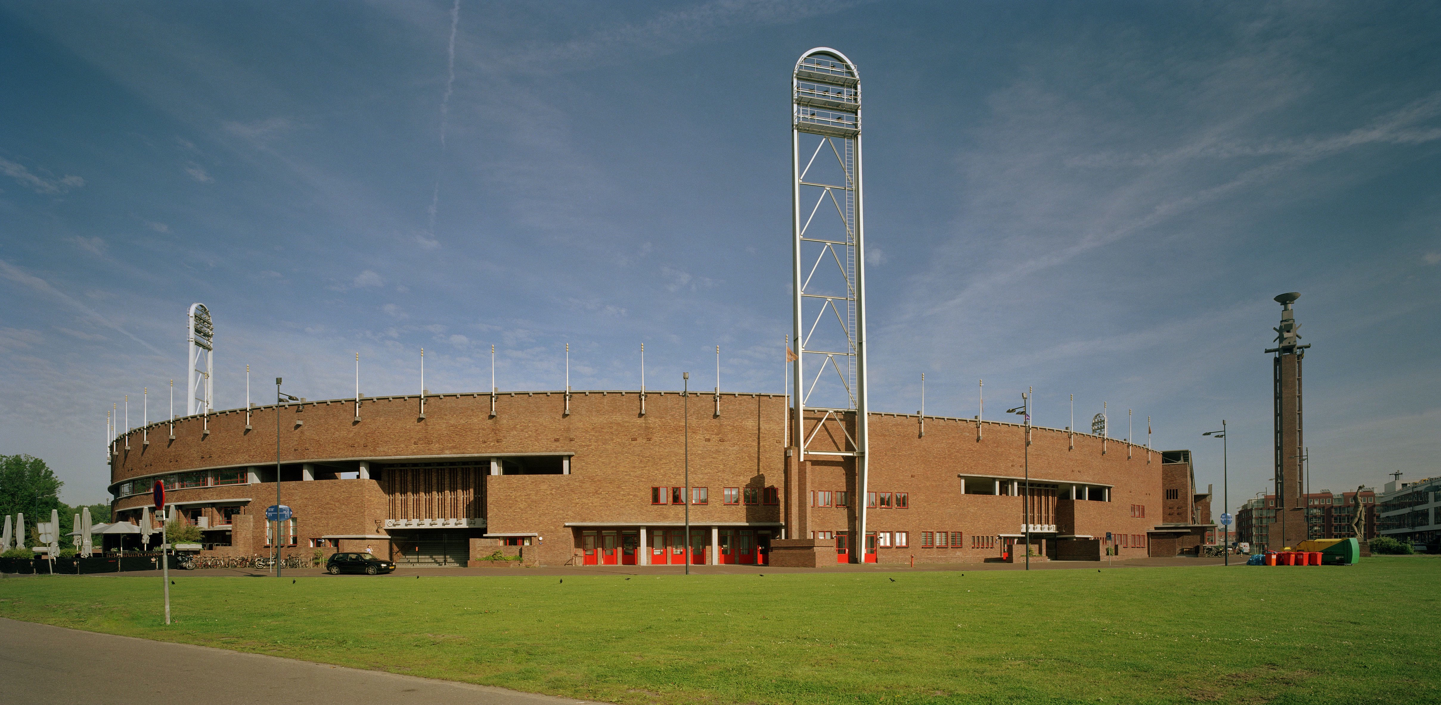 OLYMPISCH STADION: Overzicht Olympisch Stadion (opmerking: Gefotografeerd voor Monumenten In Nederland Noord-Holland)